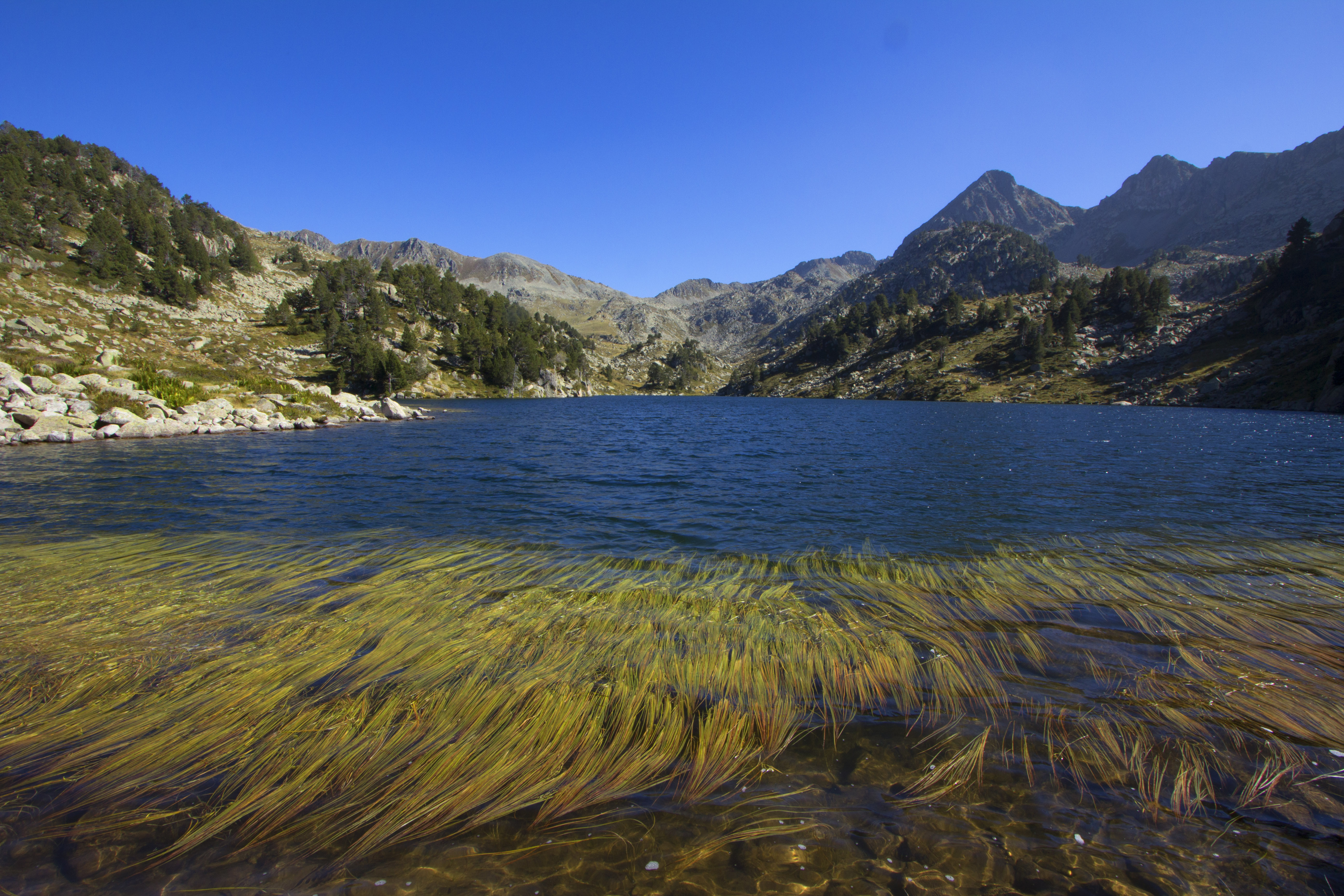 Estany del Circ de Baciver, al Massís de Beret